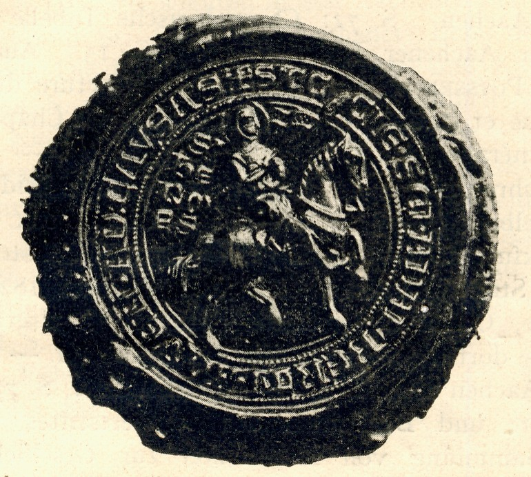 Stiftssiegel Adalbertstift, Aachen.